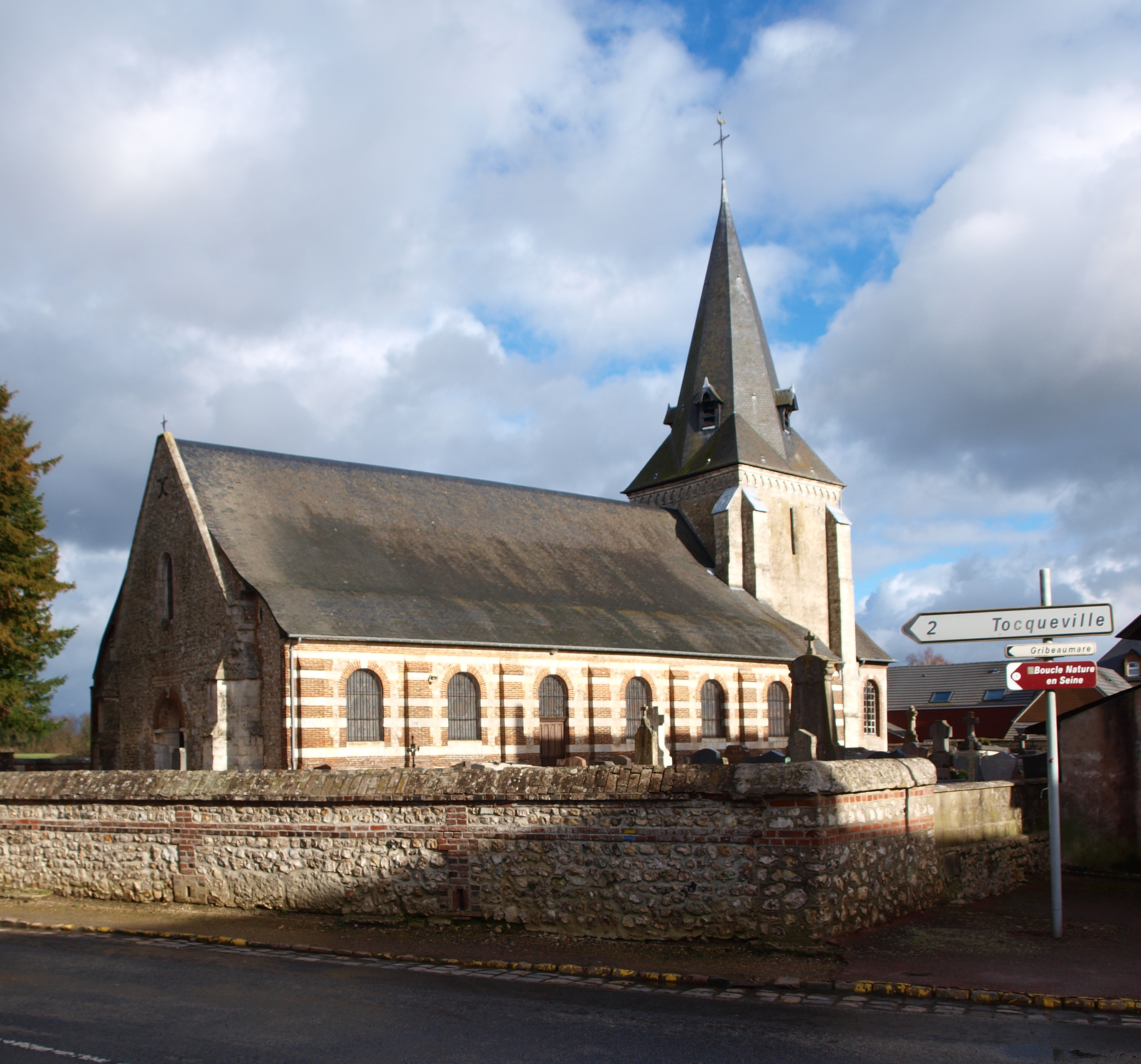 Bourneville (Eure, France)